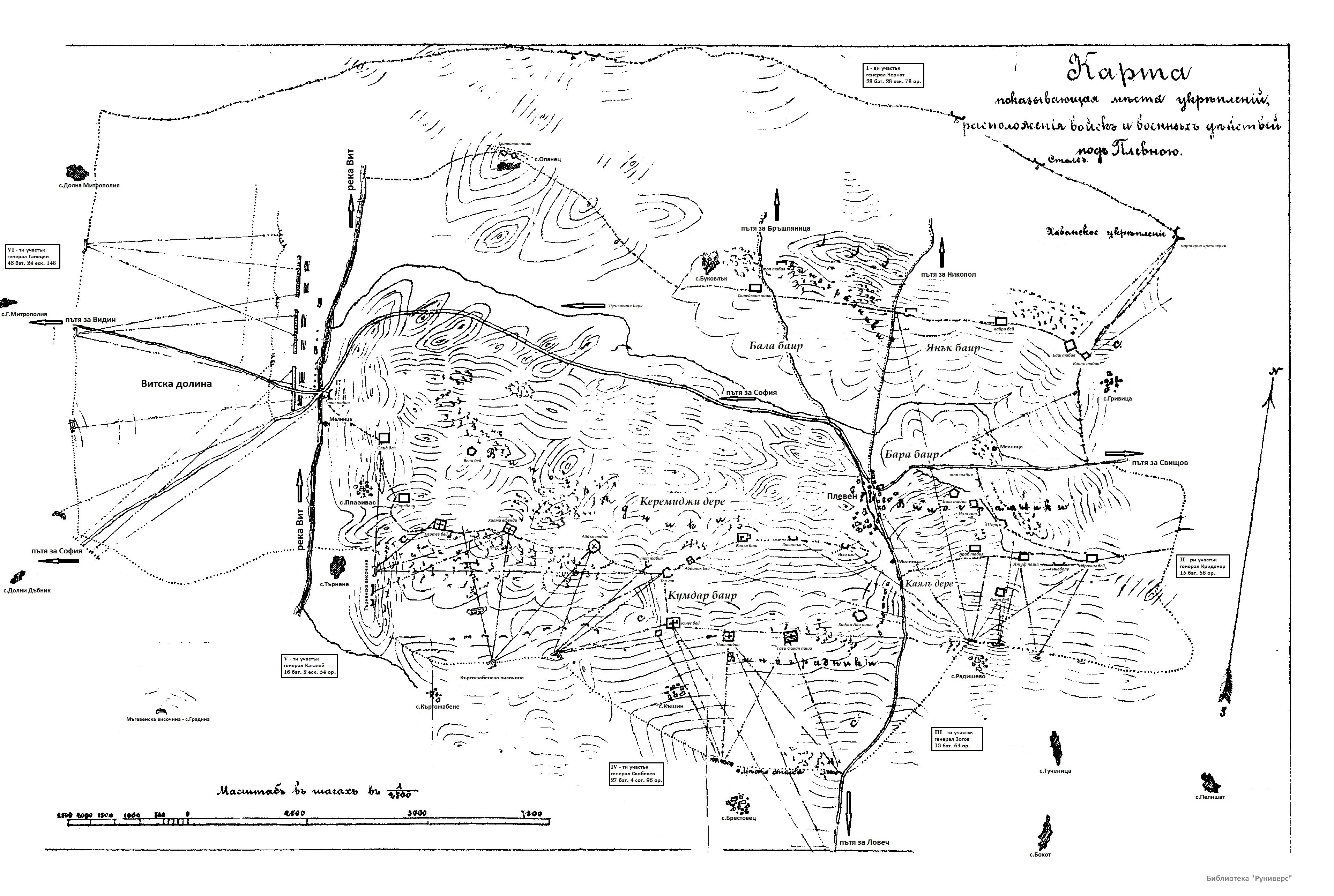 Турски укрепления при Плевен от 1877г.